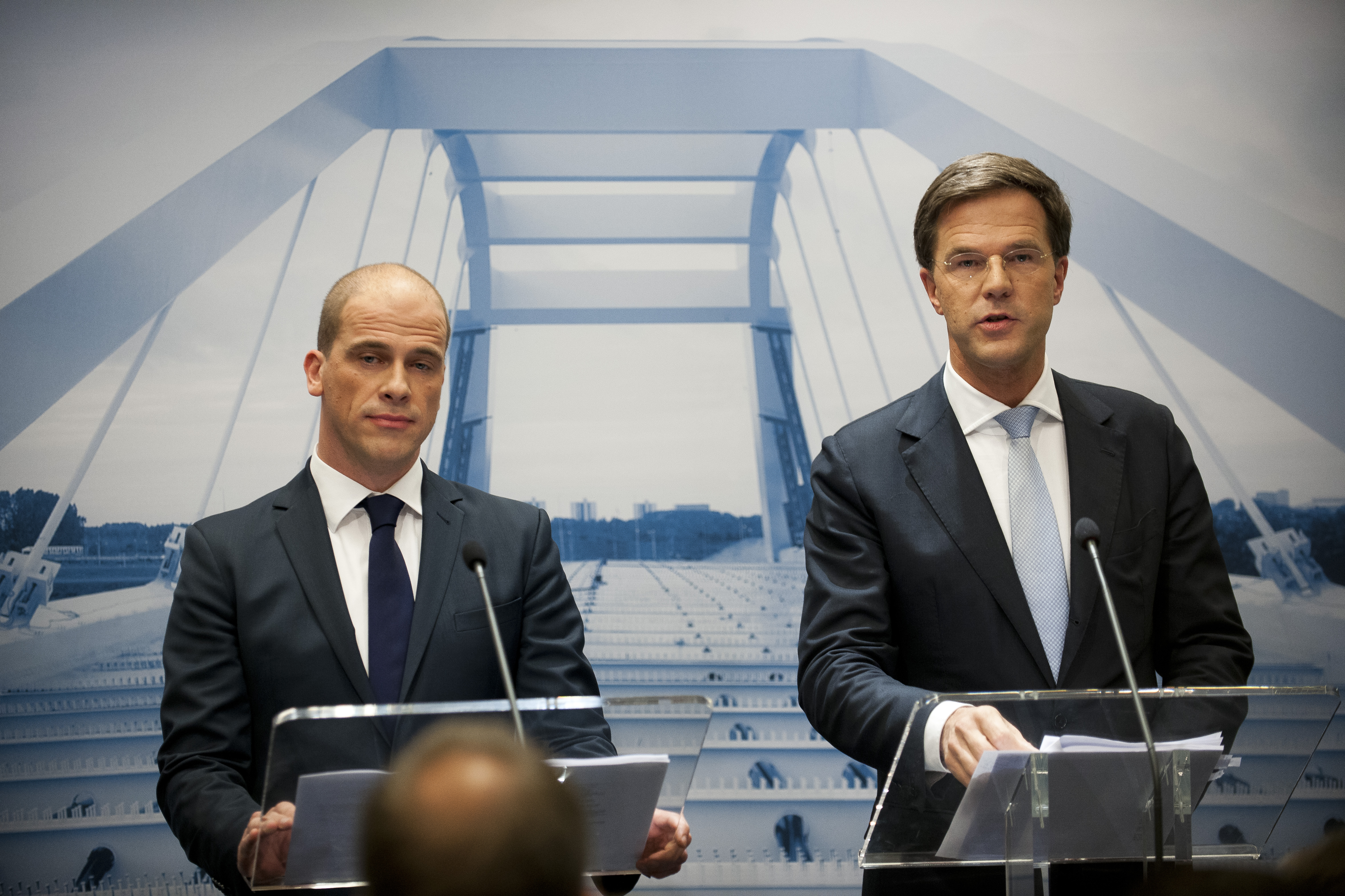 PvdA-leider Samsom en VVD-leider Rutte presenteren het Regeerakkoord 'Bruggen Slaan'.